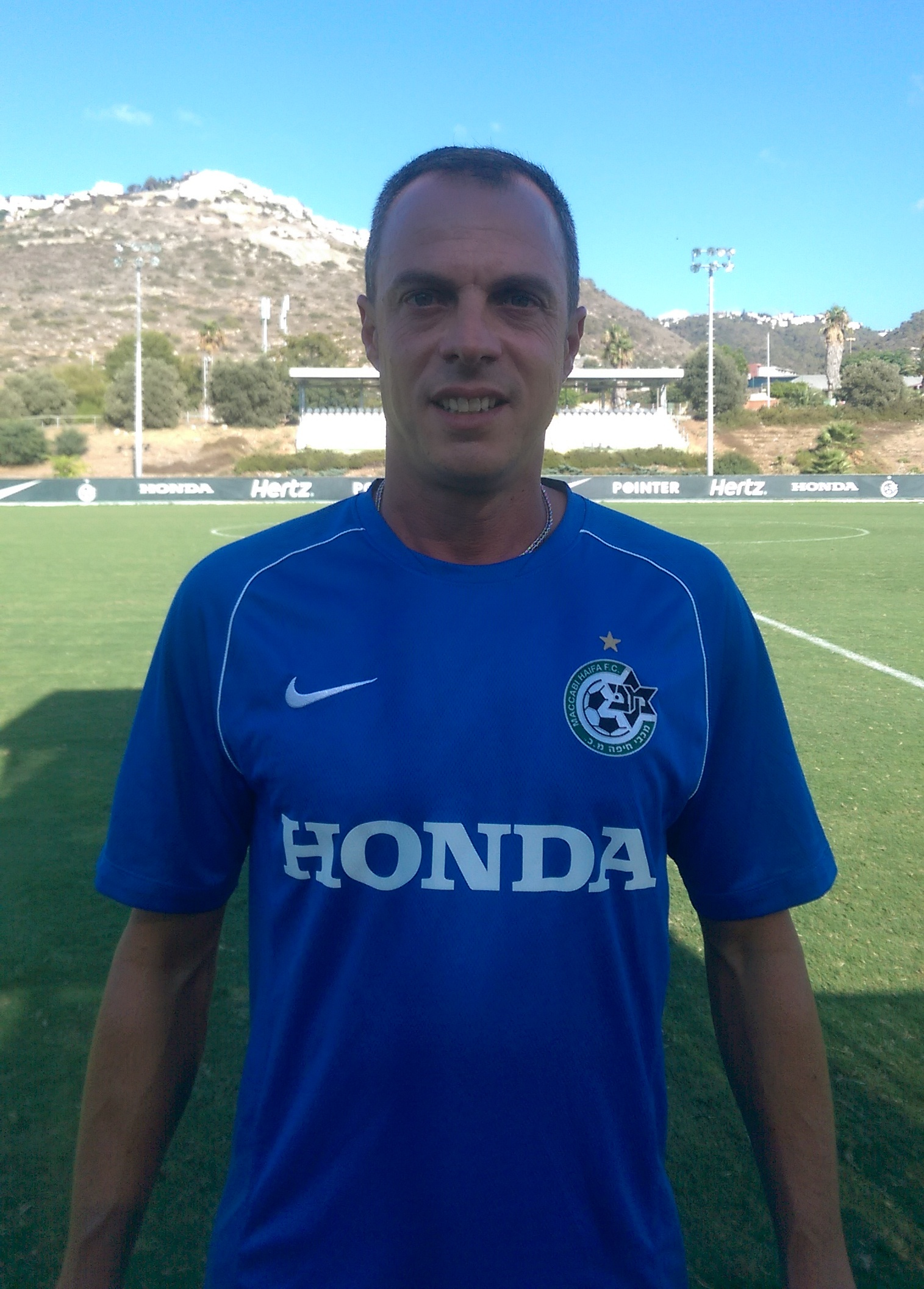 כדורגלן העבר רפי כהן